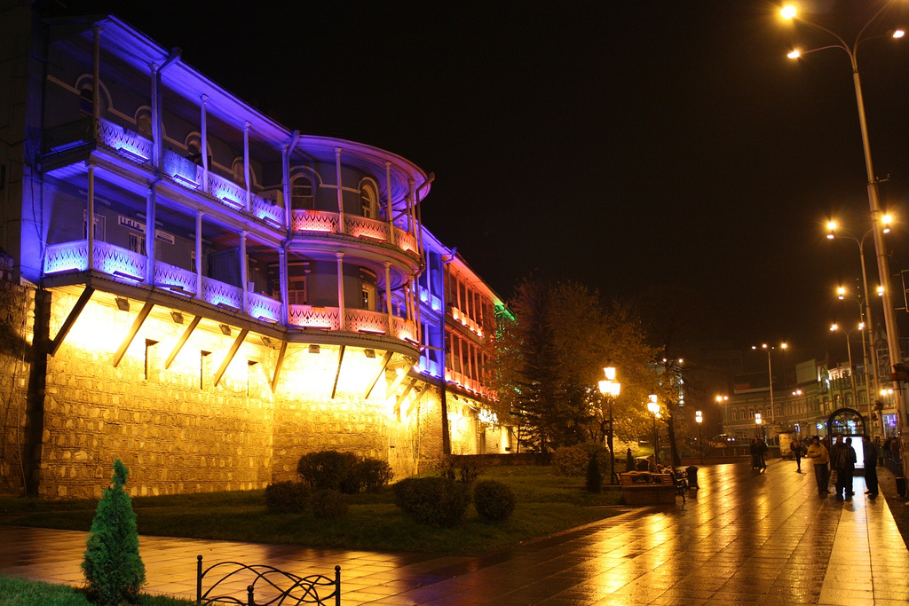 რესტავრირებული ქუთაისი